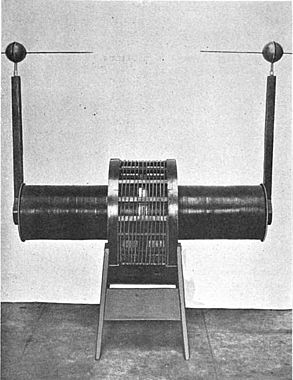 م